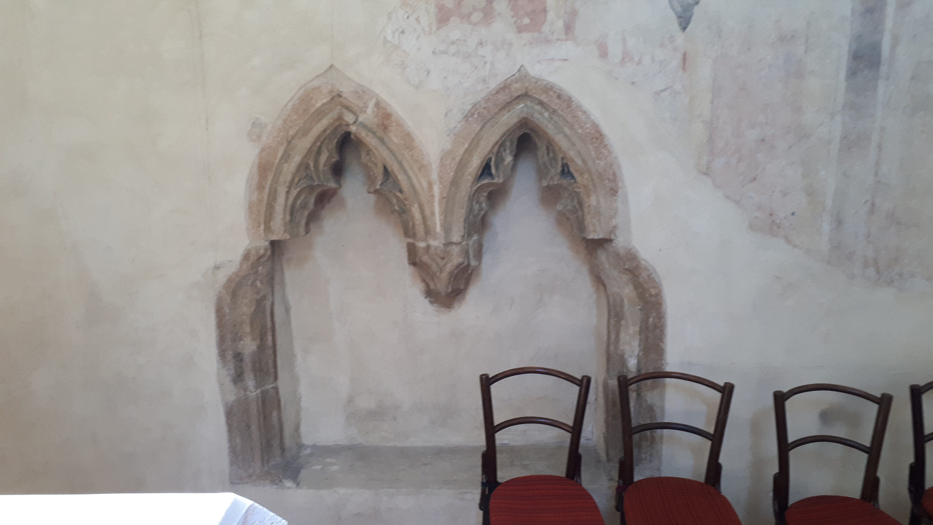 Drásov